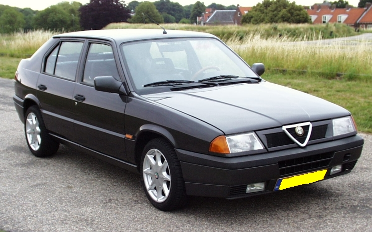 (Original text: Alfa Romeo 33 1.3 VL uit 1991)